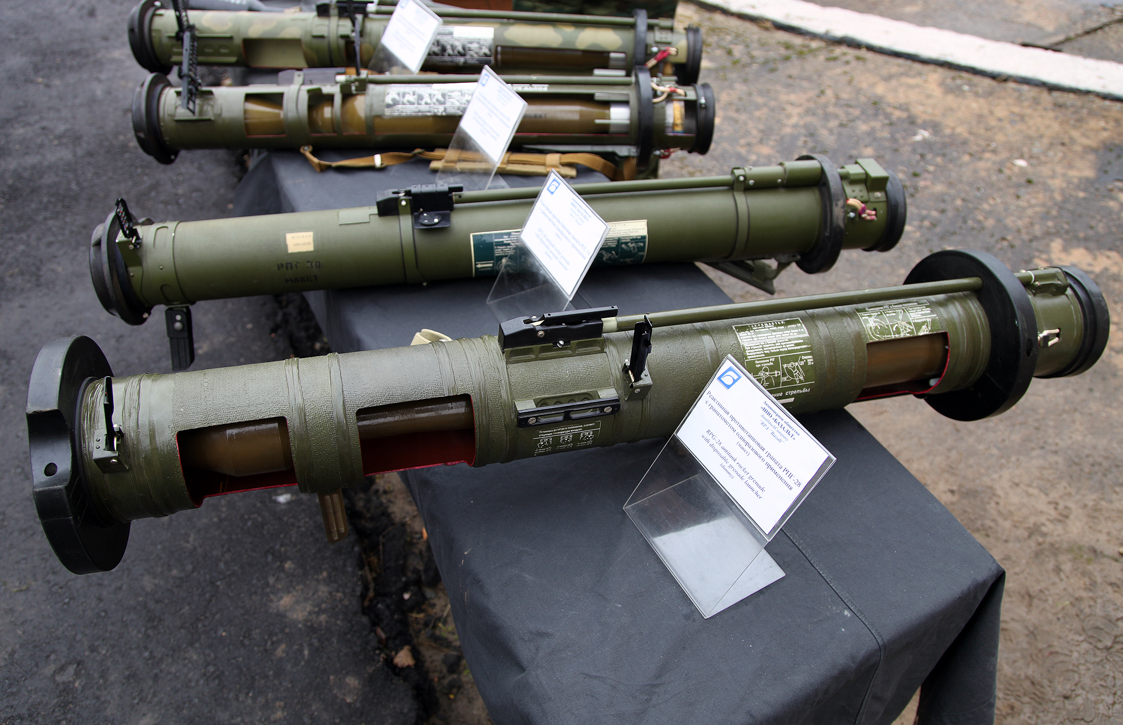 РПГ-28